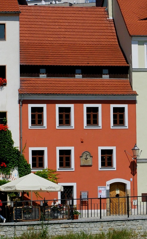 Zgorzelec, kamienica, ul. Daszyńskiego 12, XVI-XVIII, k. XIX, nr rej.: 1298/J z 10.06.1997